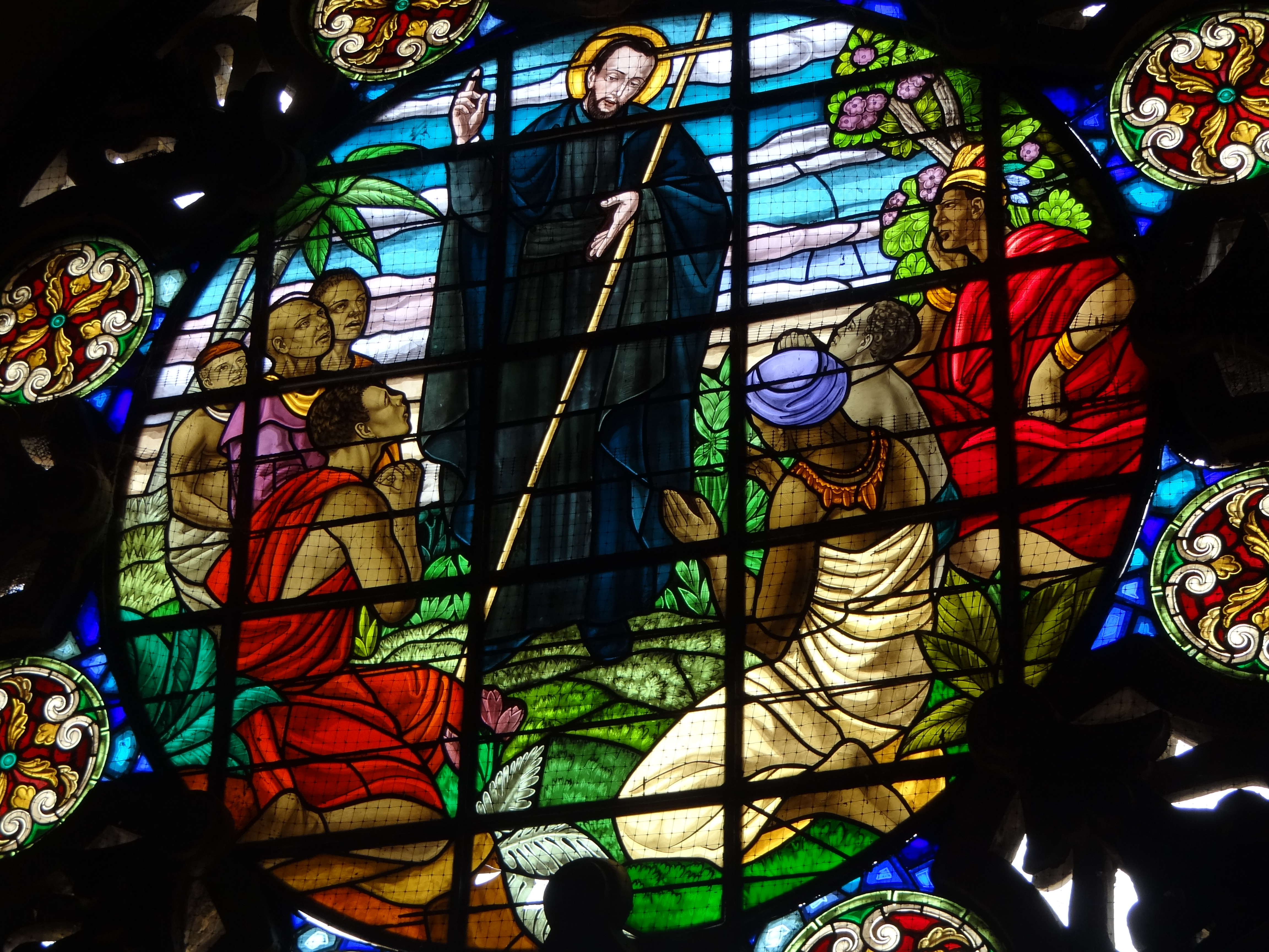 Iglesia y Claustro de San Pedro Claver